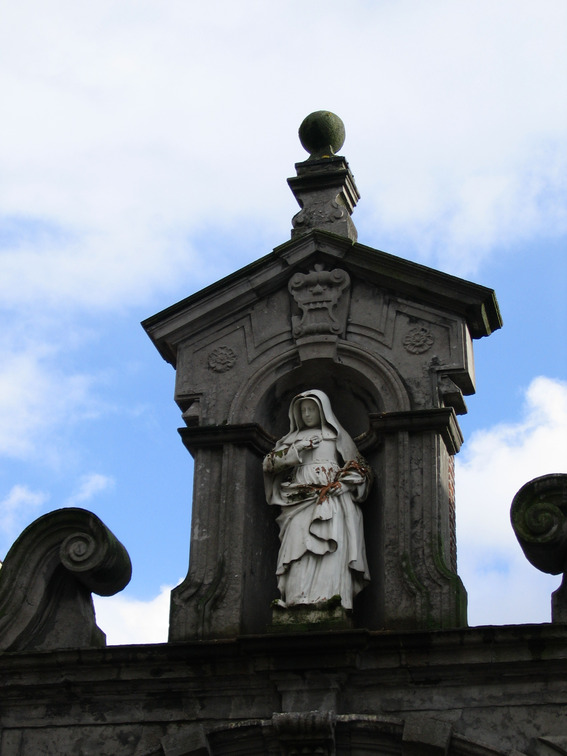 Heilige Begga - Eigen foto